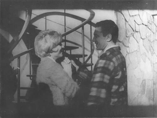 Fotografía blanco y negro sobre papel fotográfico semimate. Escena de la película "Un viaje al más allá" donde aparecen Cristina Berys de perfil derecho, sonriendo, junto a Augusto Bonardo de perfil izquierdo, sonriendo.